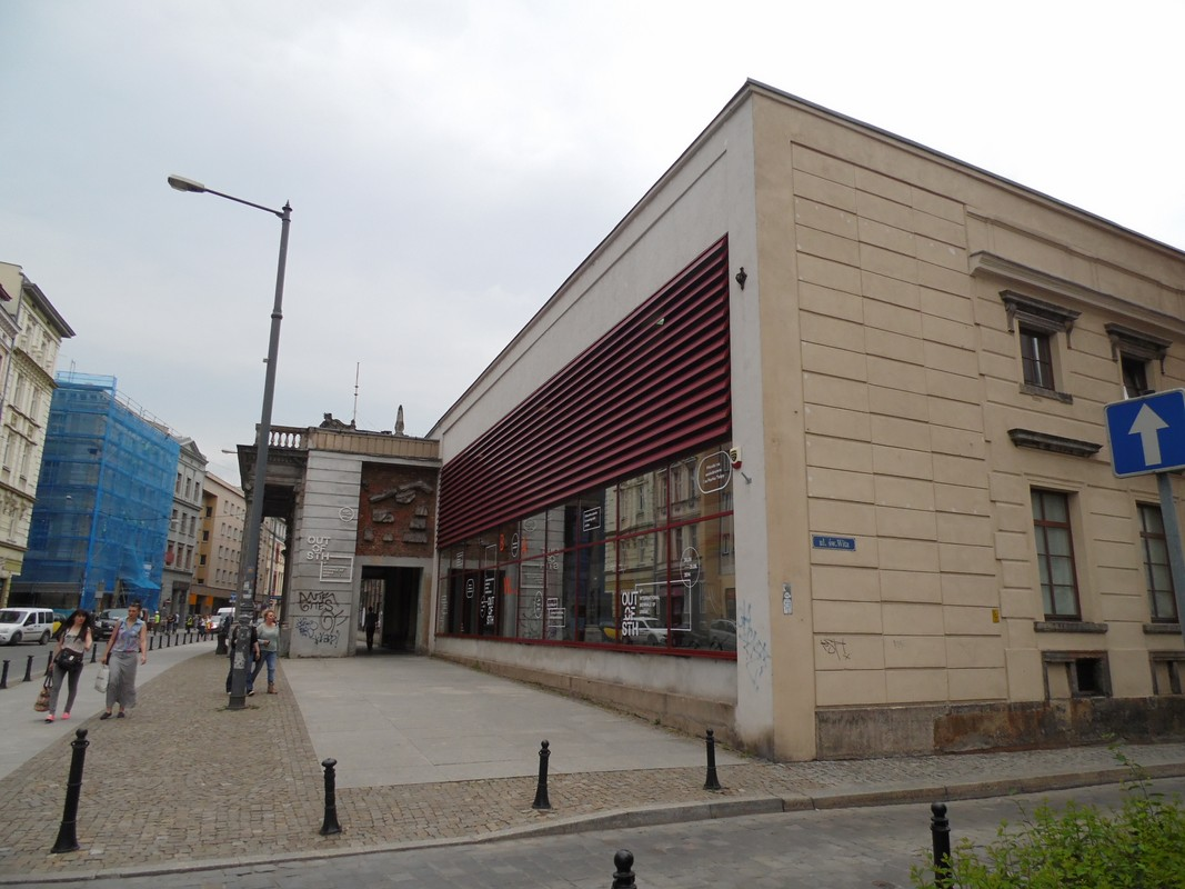 NOWOCZESNY BUDYNEK